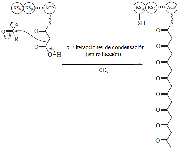 Esquema resumido de la acción de Policétido Sintasas tipo I iteractivas